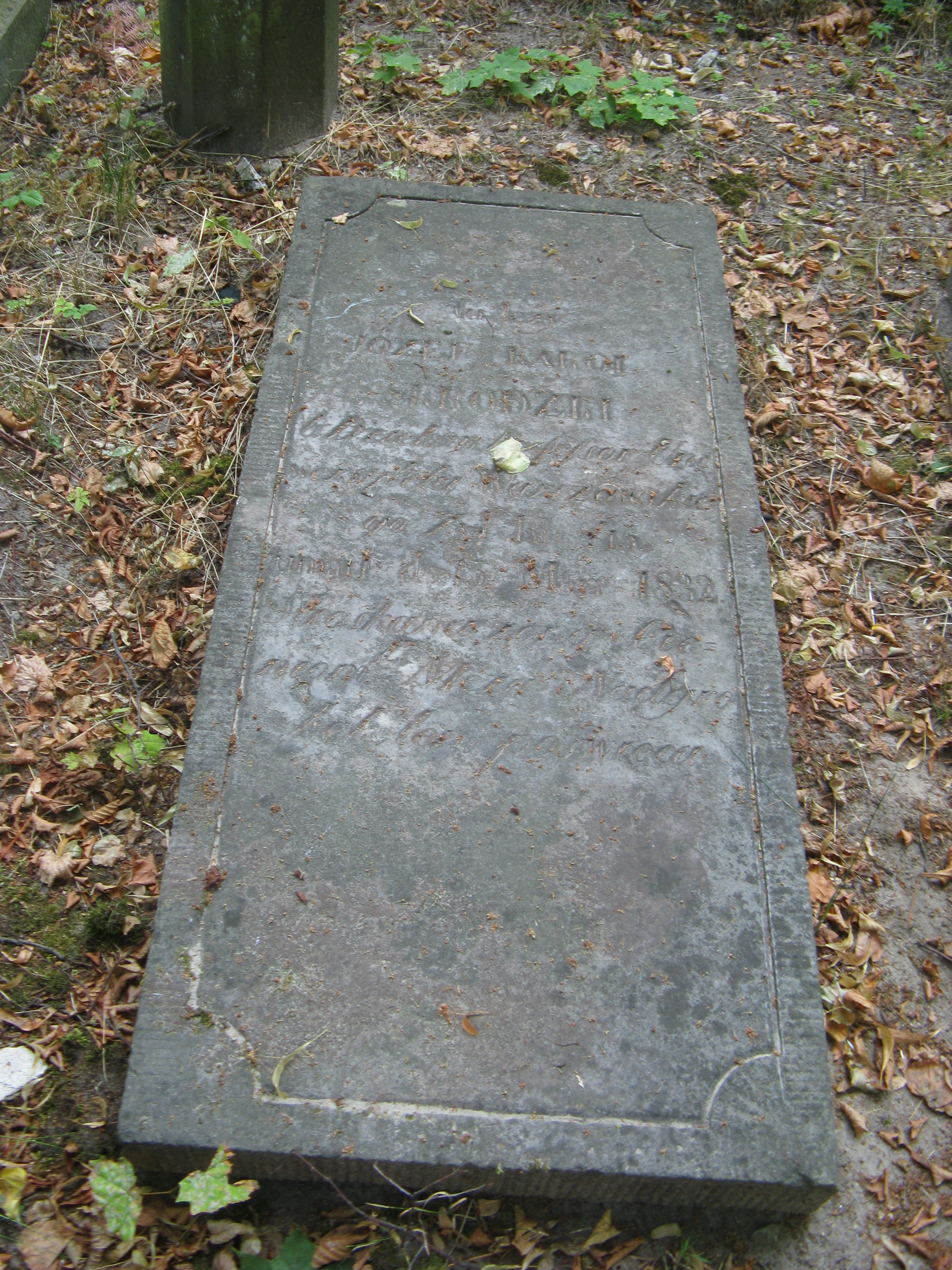 Grób Józefa Skrodzkiego na Cmentarzu Powązkowskim